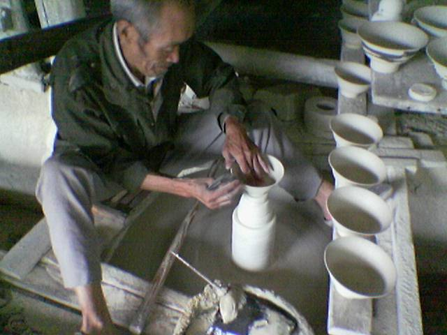 Chenyun摄于景德镇的一个示范作坊 瓷器制制坯 诺基亚手机6600 2005-8-23